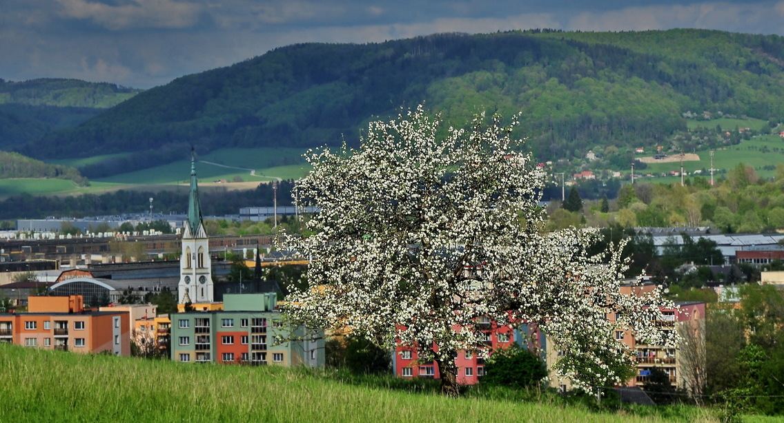 Pohled na město z úpatí Bílé hory